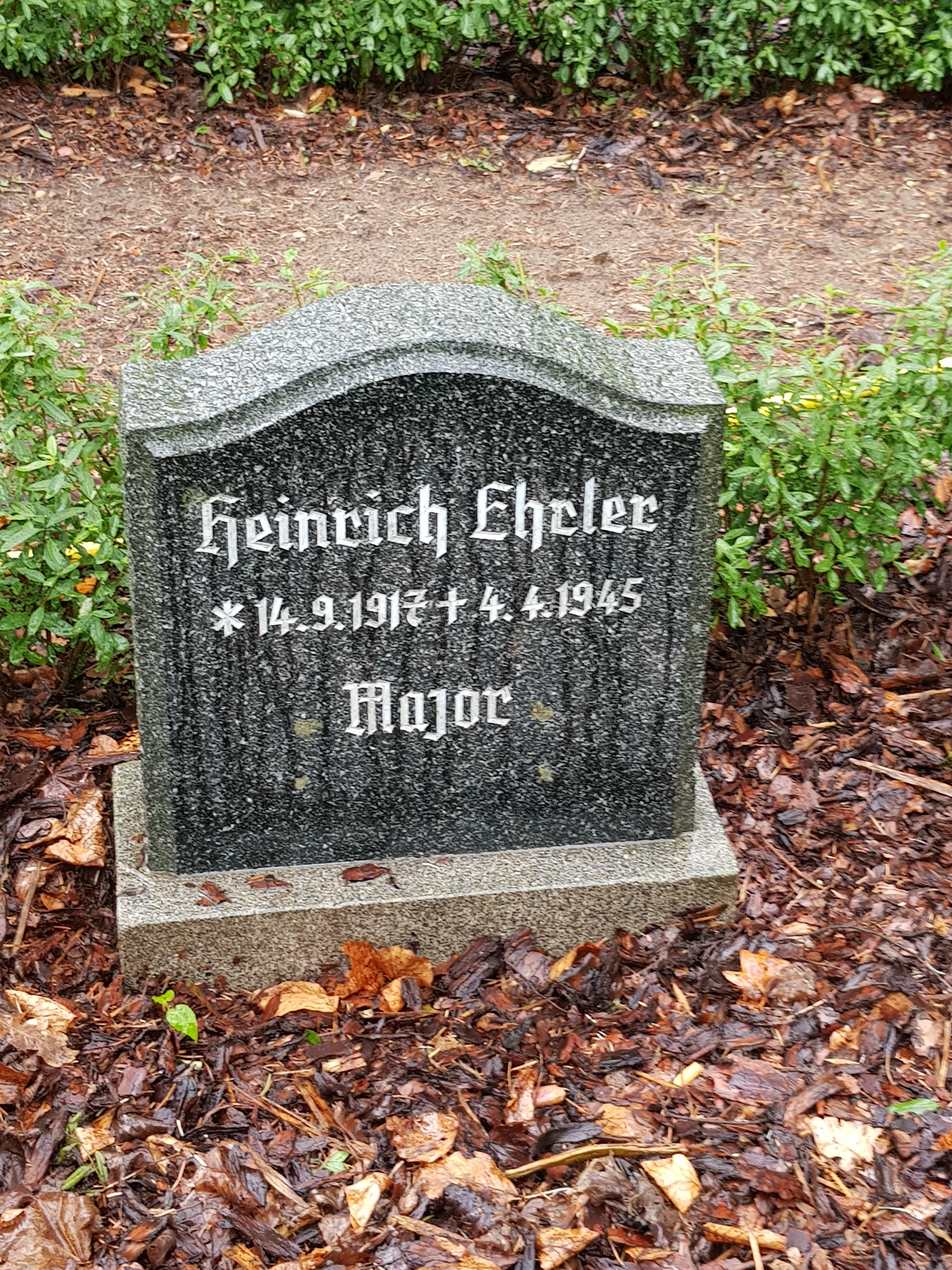 Grabstein Ehrlers auf dem Friedhof Stendal